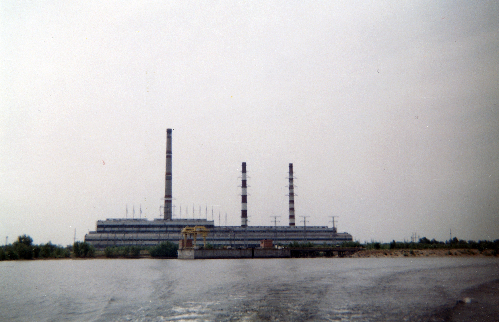 Ириклинская ГРЭС на берегу Ириклинского водохранилища